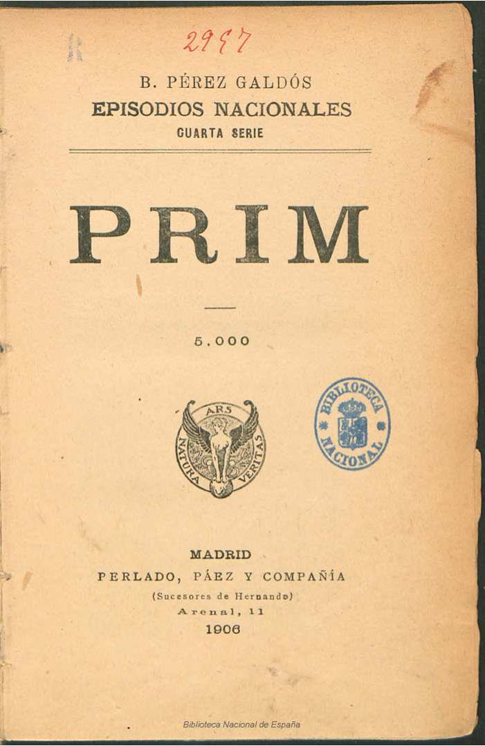 Prim ; B. Pérez Galdós Autor: Pérez Galdós, Benito (1843-1920) Fecha: 1906 Datos de edición: Madrid, Perlado, Páez y Compañía